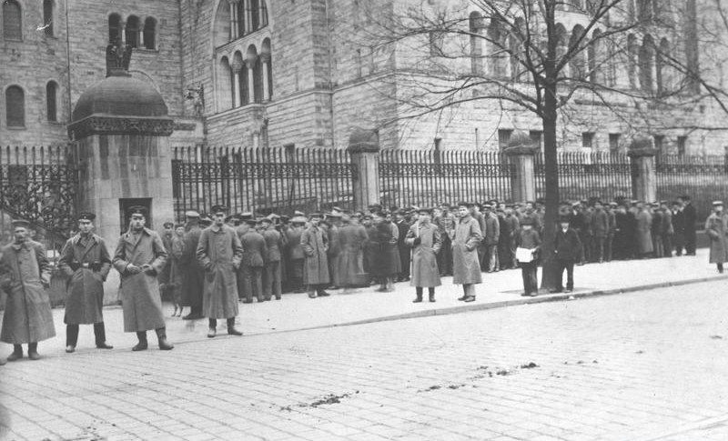 Żołnierze niemieccy pod Zamkiem Cesarskim w Poznaniu.